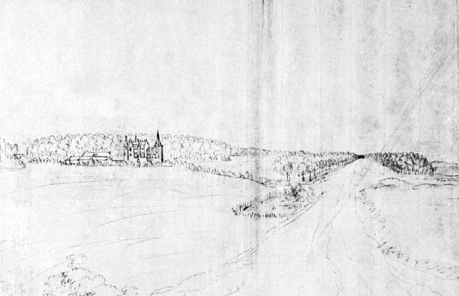 Burg Reuschenberg (bei Elsdorf) und Umgebung